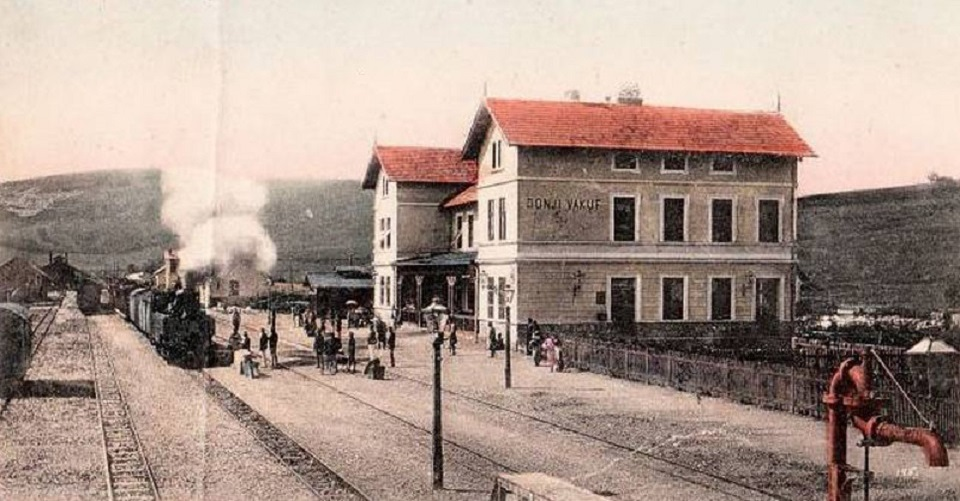 Bahnstation Donji Vakuf